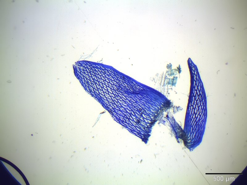 Sphagnum subnitens, Stammblatt, 40x